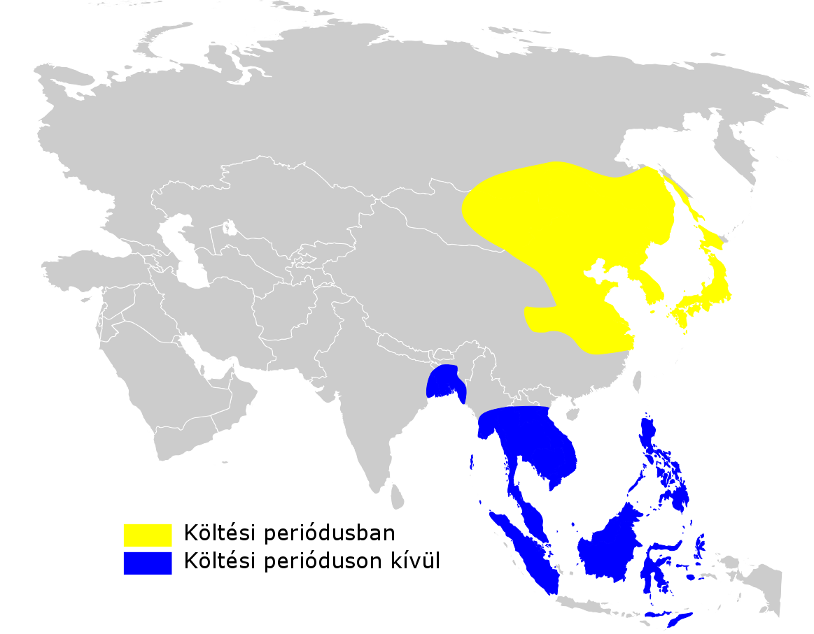 Acrocephalus orientalis distribution map, based on